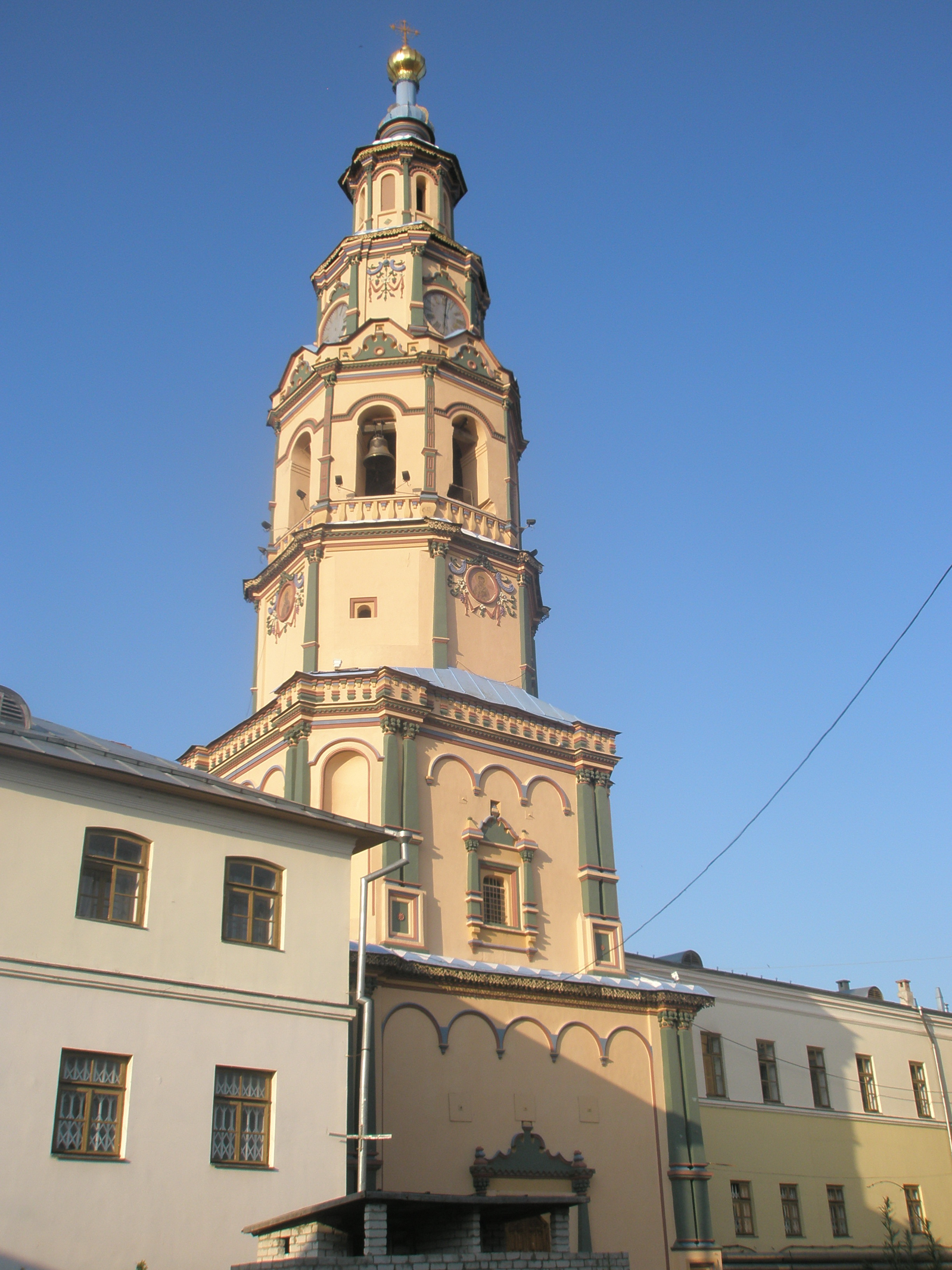 Колокольня Собора Петра и Павла, Казань, Россия